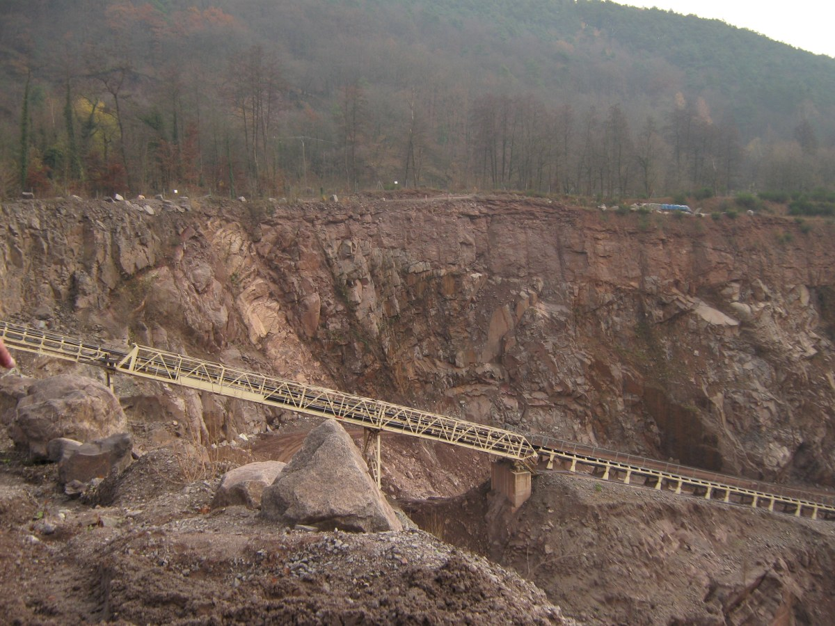 76857 Waldhambach, Germany